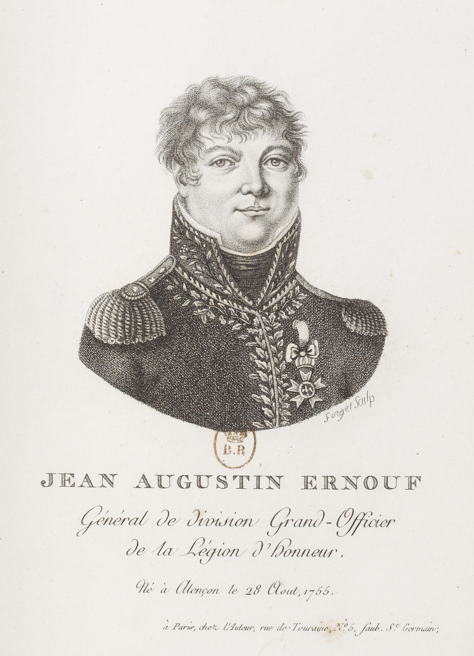 Collection complète des portraits des Grands-Aigles et des Grands-Officiers de la Légion d Honneur... / publiée par... Meyer, peintre... : vue 48 - Jean Augustin Ernouf, général de division